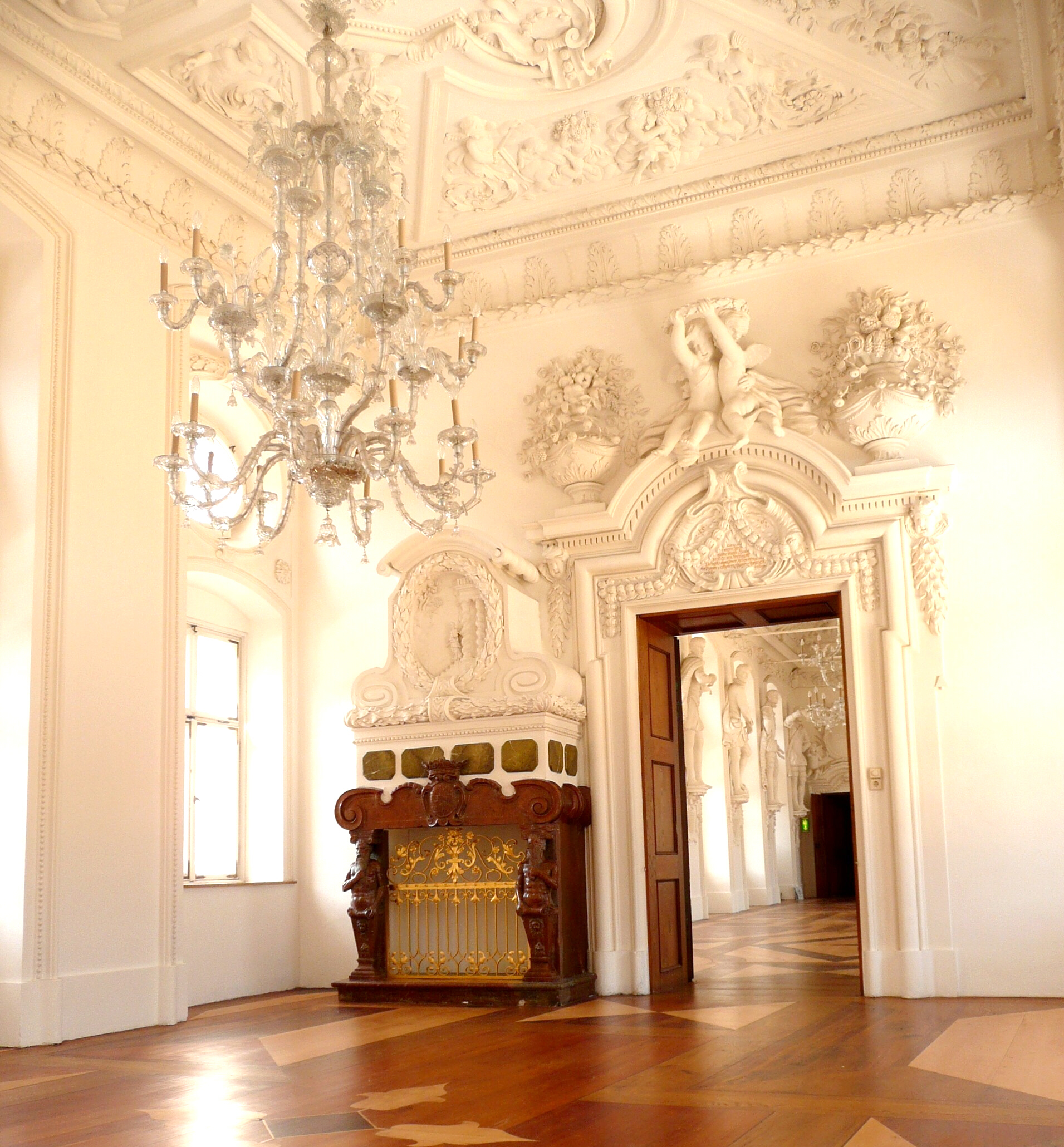 Mittlerer Raum der Zimmerflucht des Festsaales im Südflügel des Schlosses mit Lüster und Kamin.